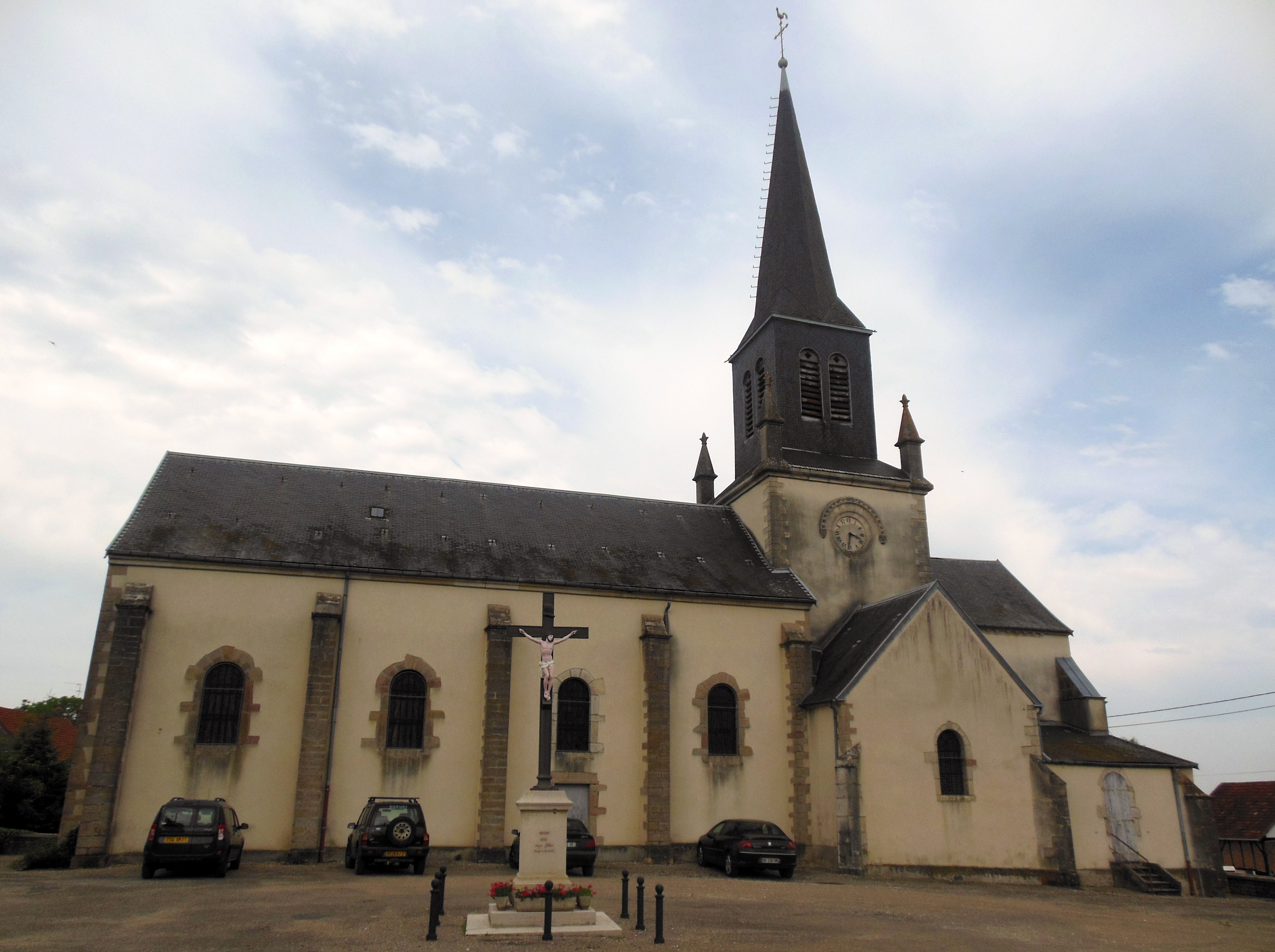 Eglise Notre-Dame-de-la-Nativité (XIXe s), Rue de l'Eglise, à Athée (21).